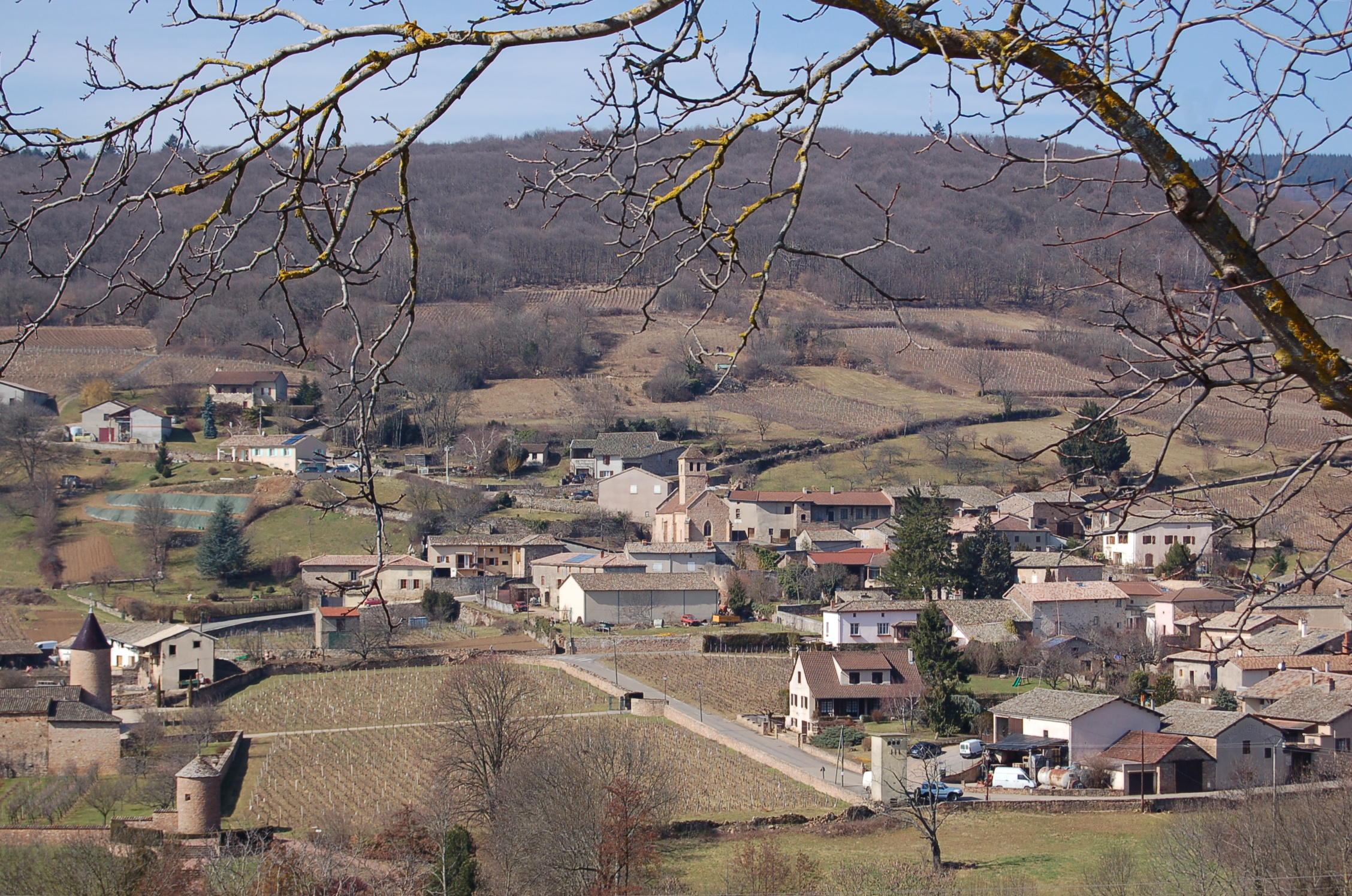 Vue générale du village (axe Est-Ouest)